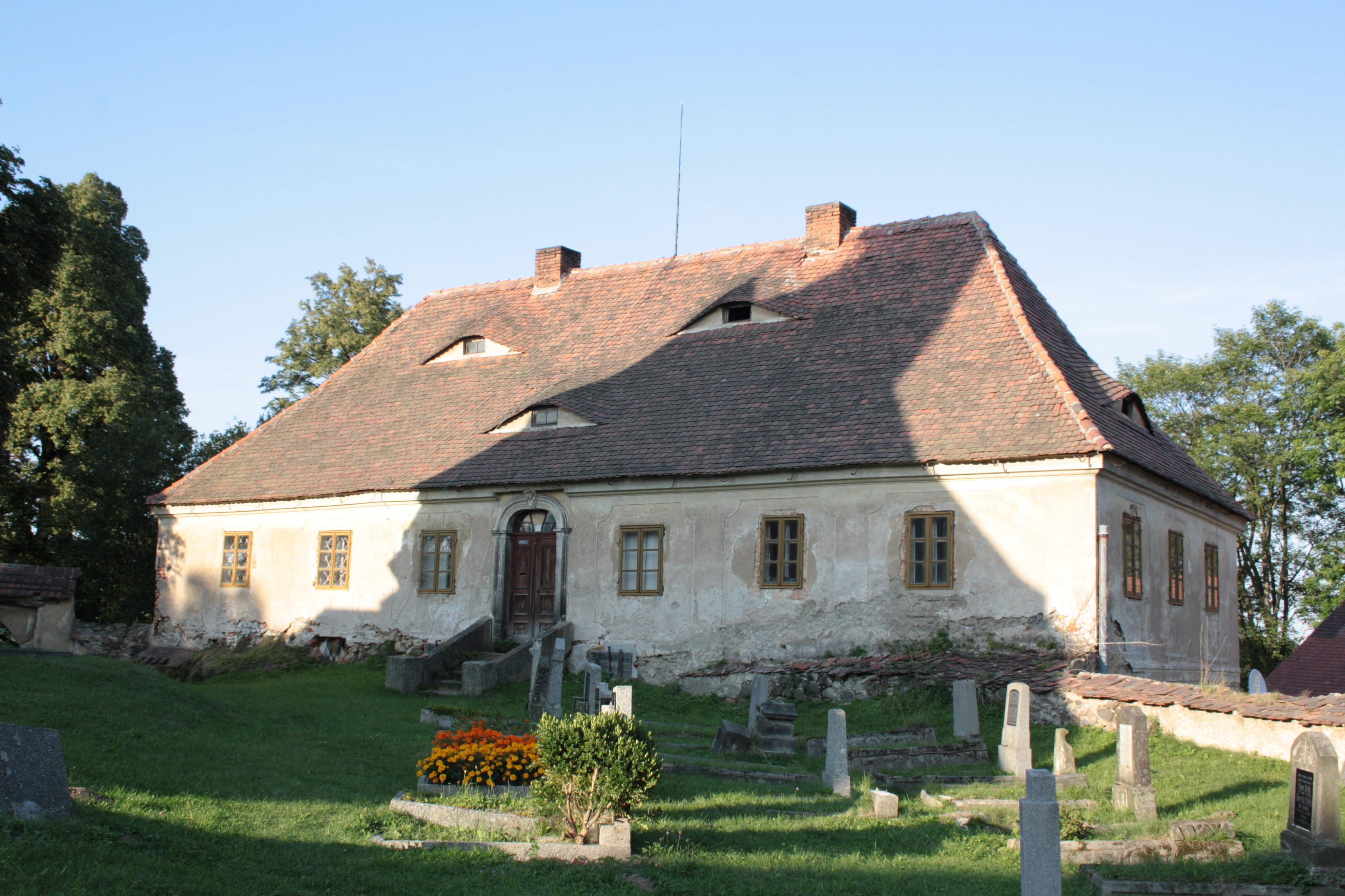 This photograph was taken with a DSLR from WMCZ's Camera grant. Fara ve Vsi u Černous v Libereckém okrese (dům číslo popisné 28).